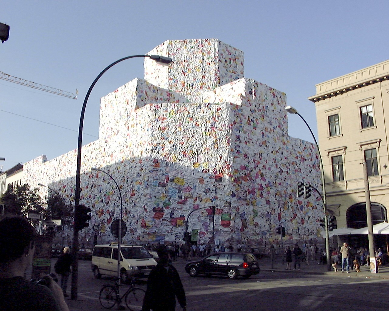 Der Künstler HA Schult verhüllte 2001 das Berliner Postfuhramt mit 5000 eingescannten und auf papierähnlicher Folie vergrößerten Liebesbriefen.